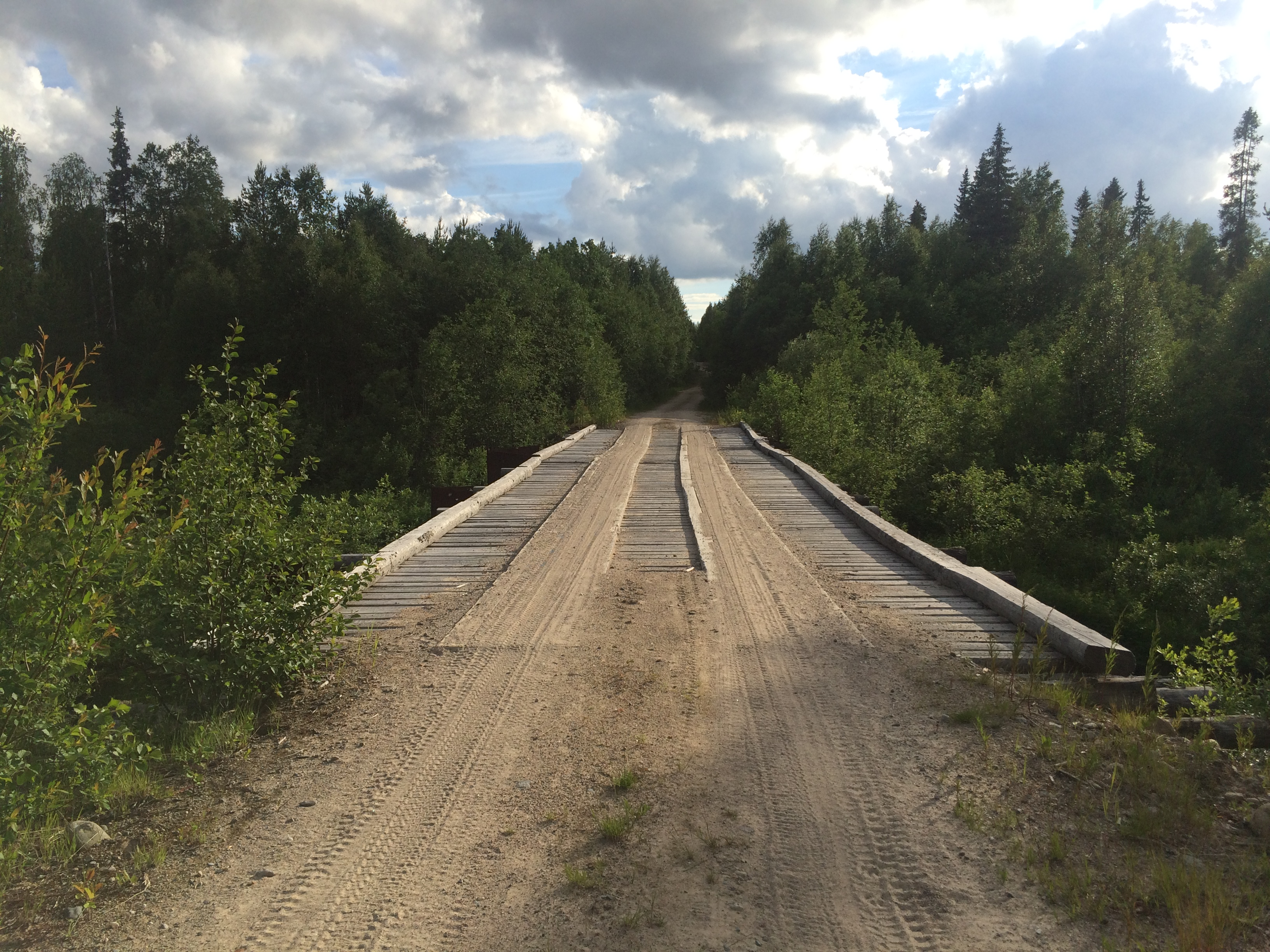 Кумбукса (приток Вожмы)